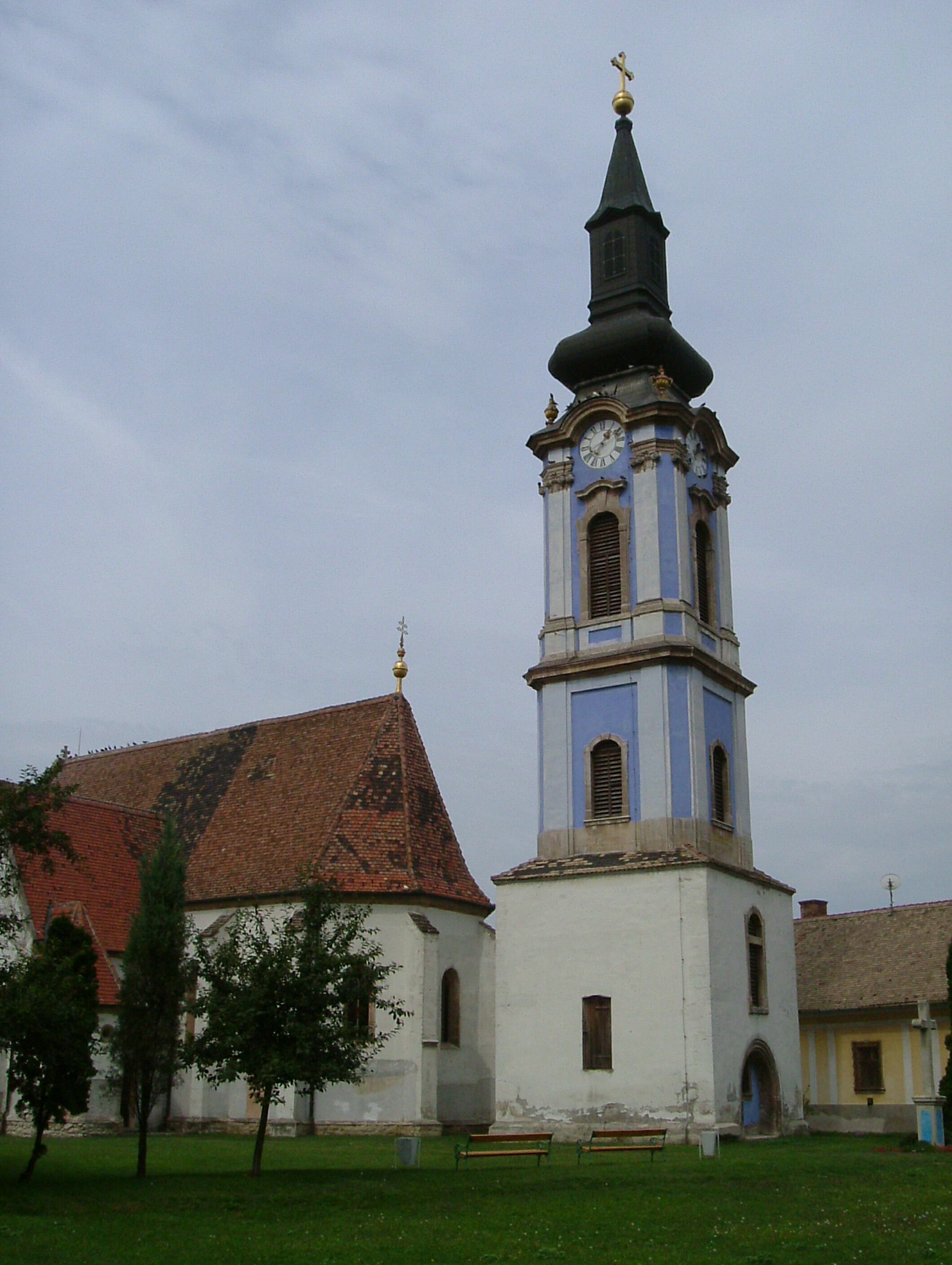 Ráckeve. Gótikus szerb templom.